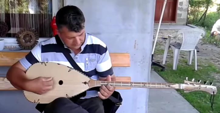 Viro ludas Ŝargijo.